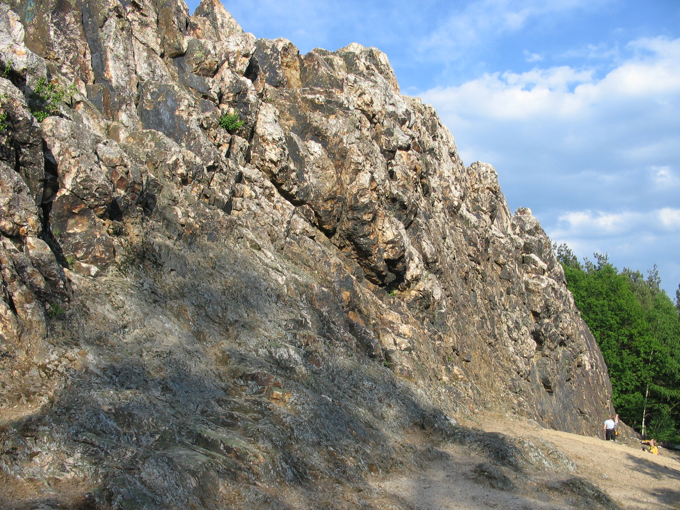 Eschbacher Klippen bei Usingen-Eschbach.